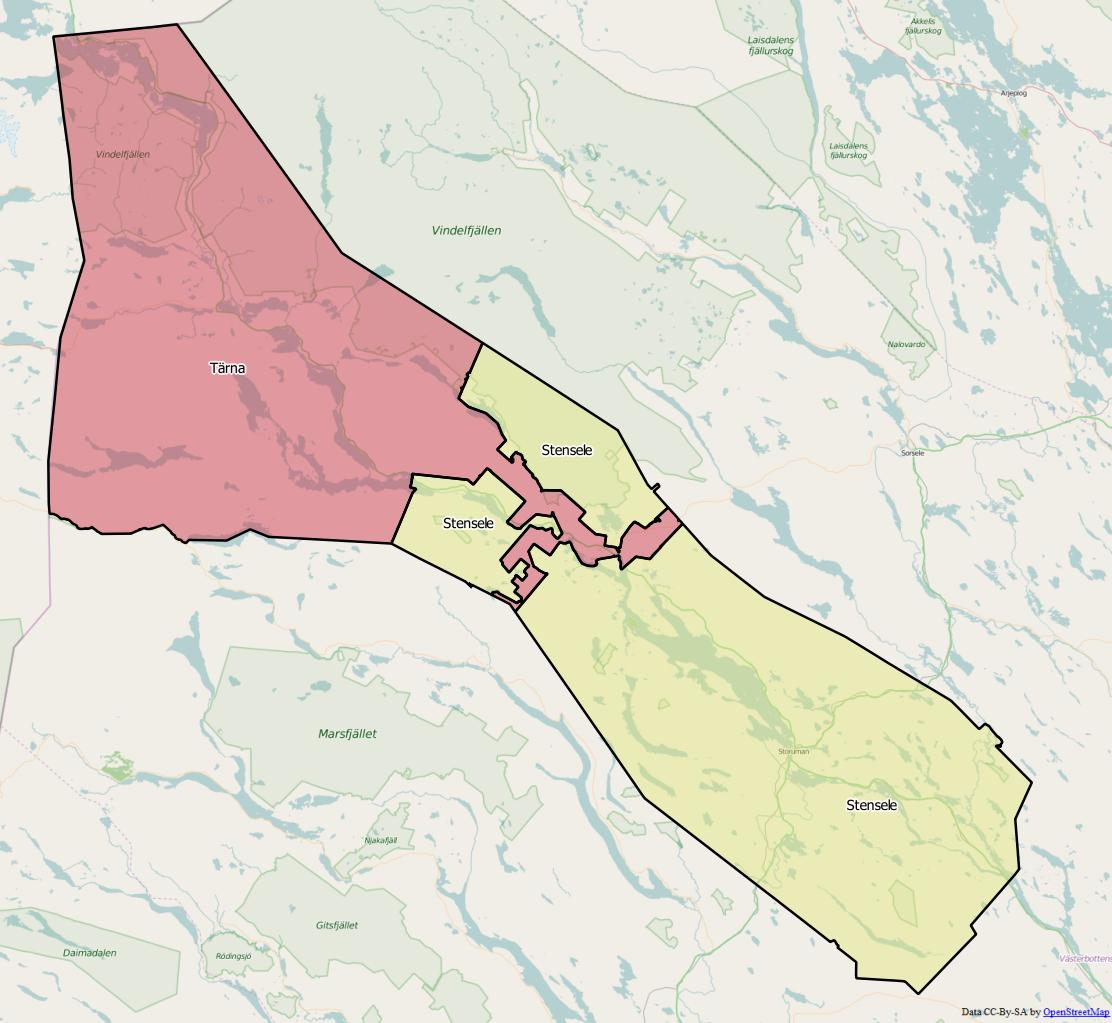 Distriktsindelningen i Storumans kommun World file: 391.47585554840816258 0 0 -391.47585554840816258 1595251.62285125232301652 9927366.9622748140245676